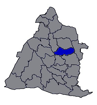 臺灣省彰化縣大村鄉。